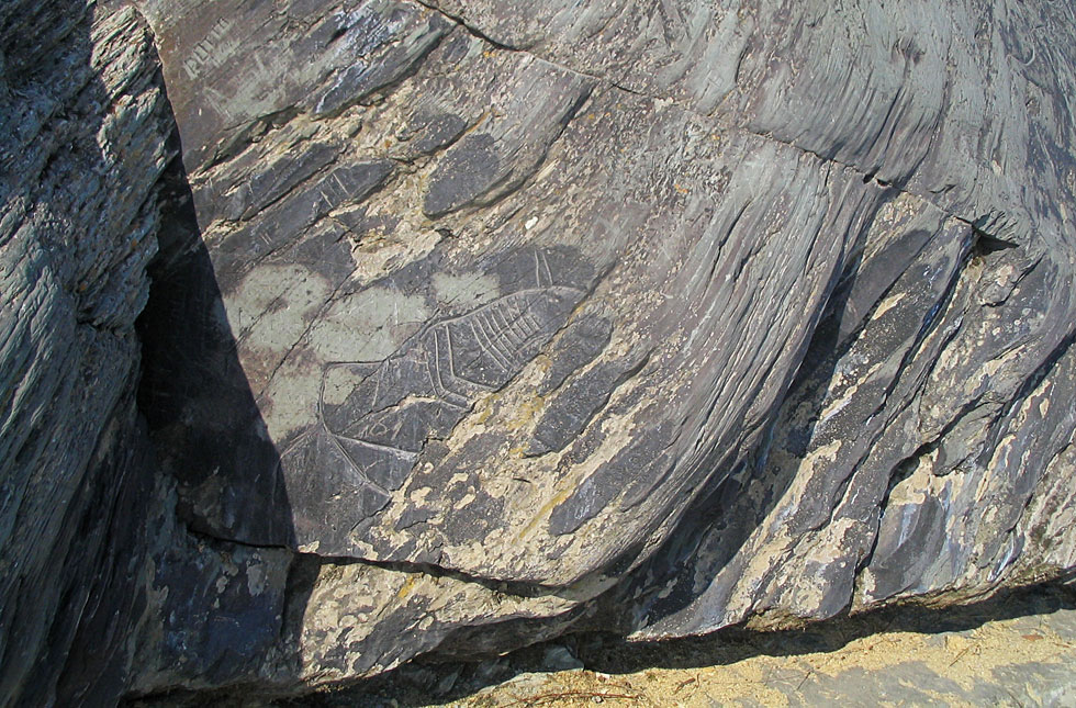 A fragment of ancient man's picture at Tomskaya Pisanitsa; RU: Фрагмент наскального изображения на скале в музее-заповеднике Томская писаница